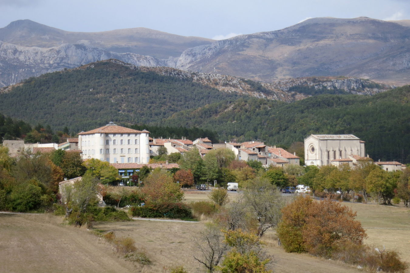 Vue de La Palud-sur-Verdon, du château et de l'église Notre-Dame de Vauvert